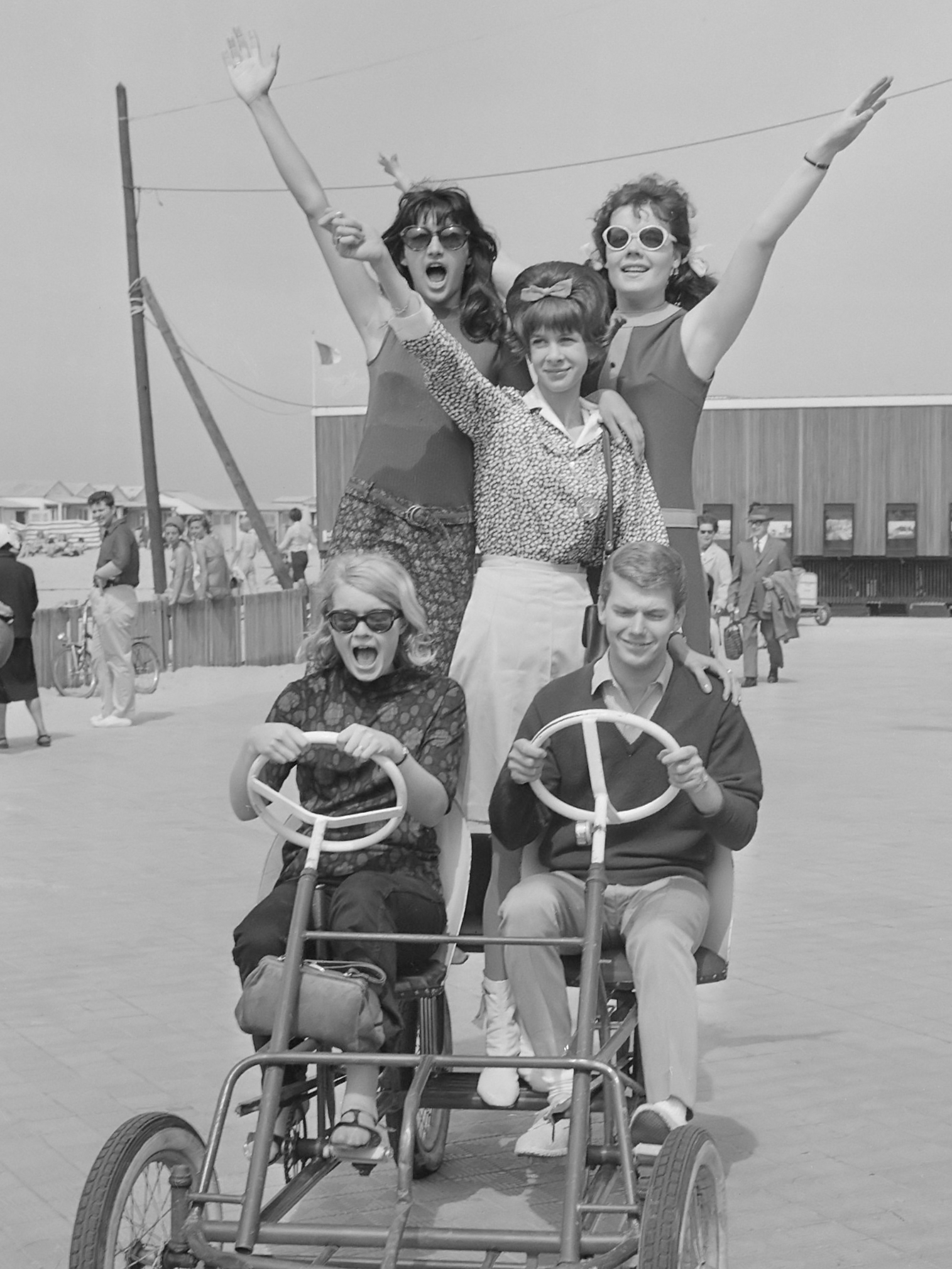 Songfestival te Knokke, de Nederlandse ploeg, Ronnie Tober en Martine Bijl aan het stuur, boven v.l.n.r. Margie Ball, Janneke Peper en Karin Kent 9 juli 1966